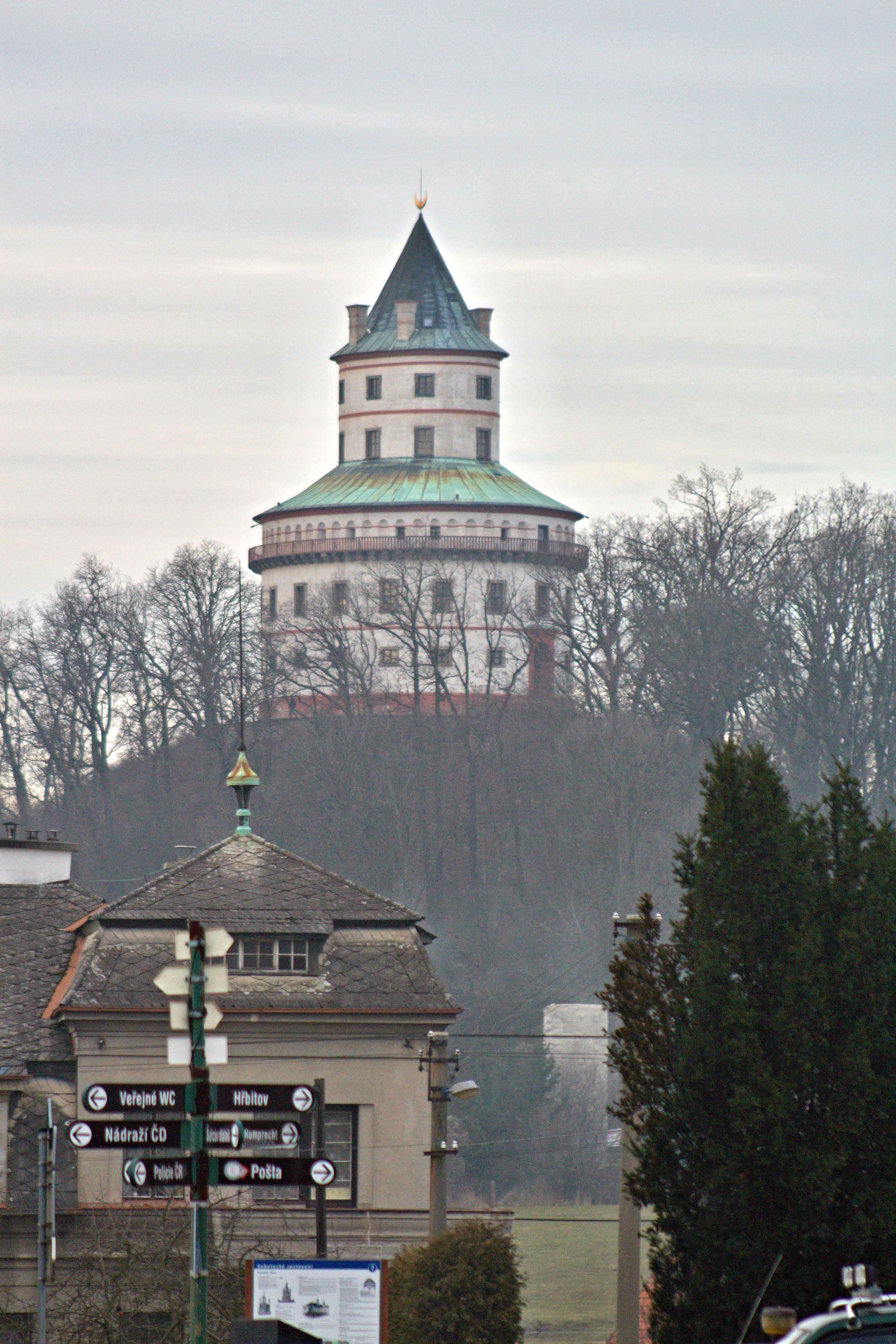 Sobotka